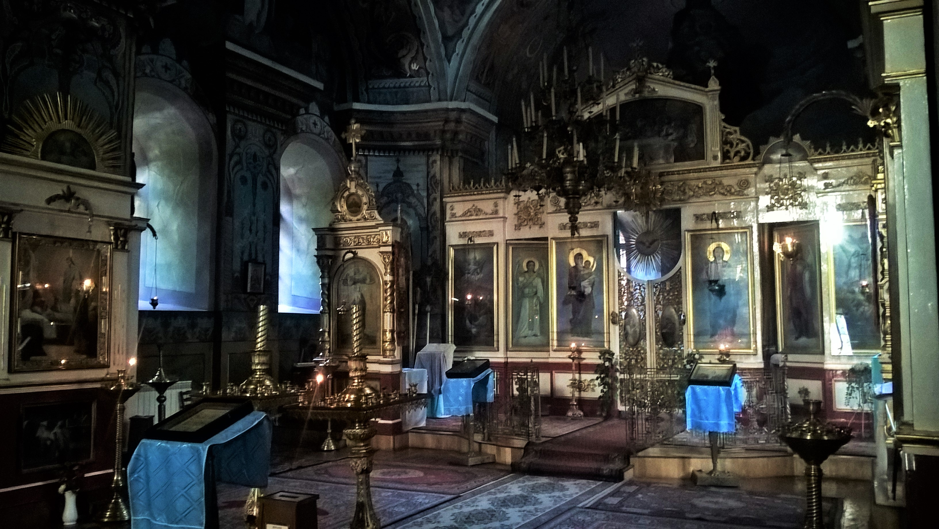 Wnętrze cerkwi Wniebowstąpienia w Kiszyniowie